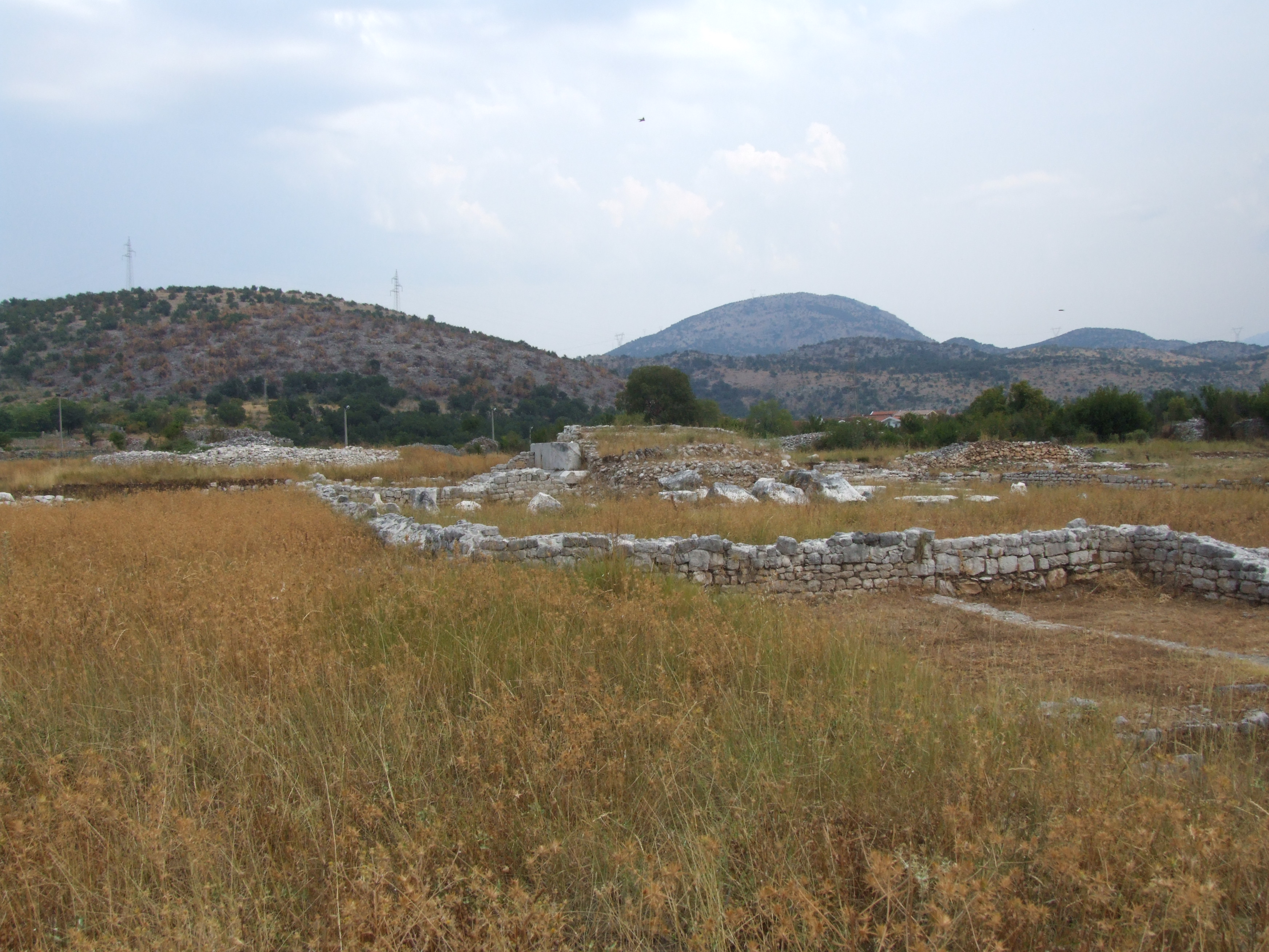 in Podgorica, Montenegro